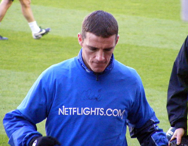 Jason Koumas